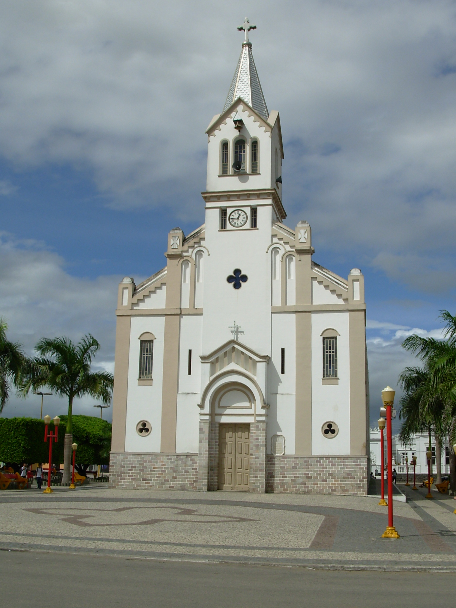 Igreja da Cidade de Simão Dias, Sergipe, Brasil